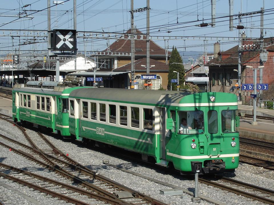 Richtung Bière ausfahrender Pendelzug bestehend aus dem Triebwagen Be 4/4 12 und dem Steuerwagen Bt 53 der Bière–Apples–Morges Bahn (BAM) im Jahre 2007 in Morges.